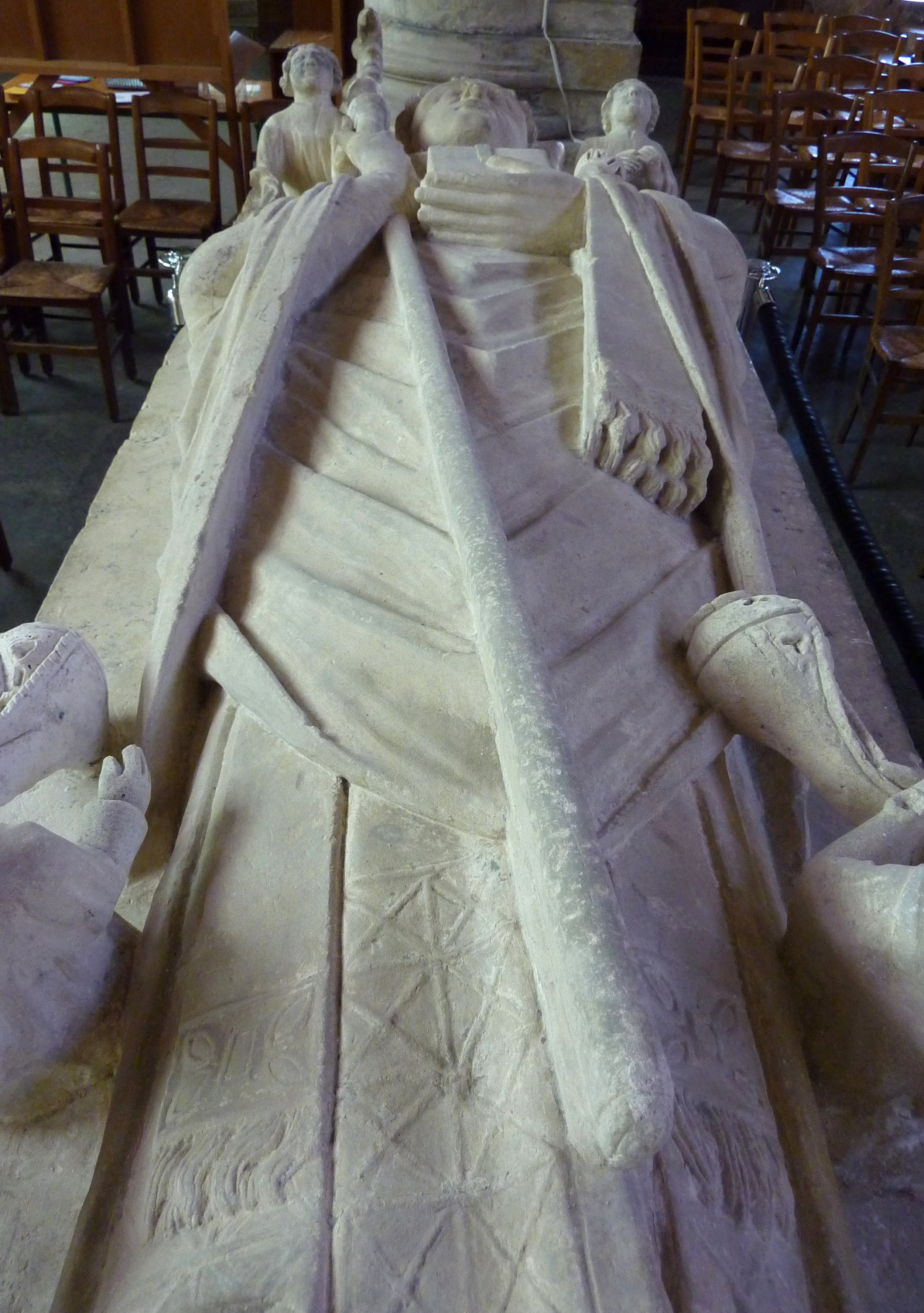 Grabmal des hl. Gautier in der katholischen Kirche Notre-Dame in Pontoise